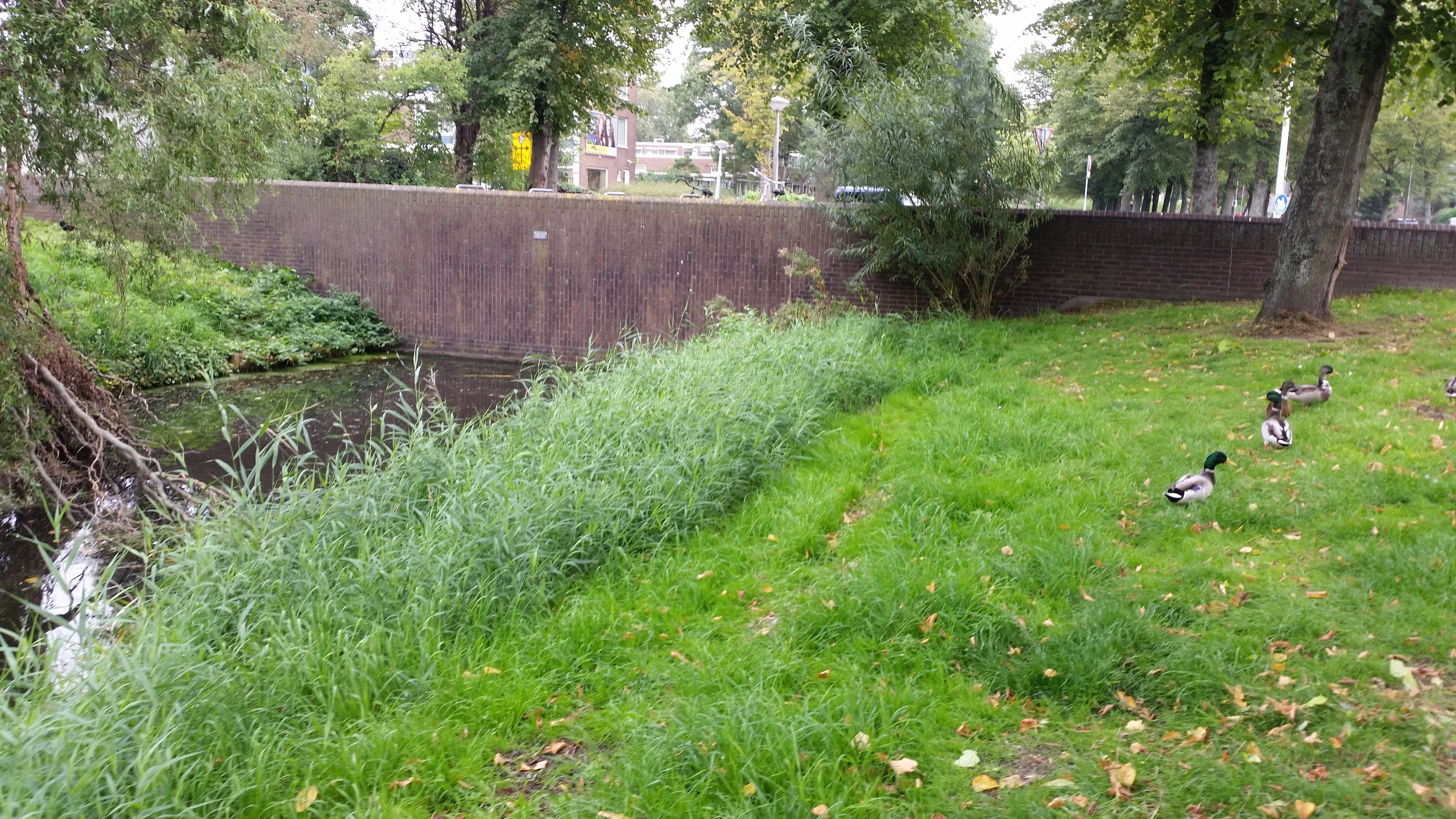 Brug 492, Sal Santenbrug, zijaanzicht